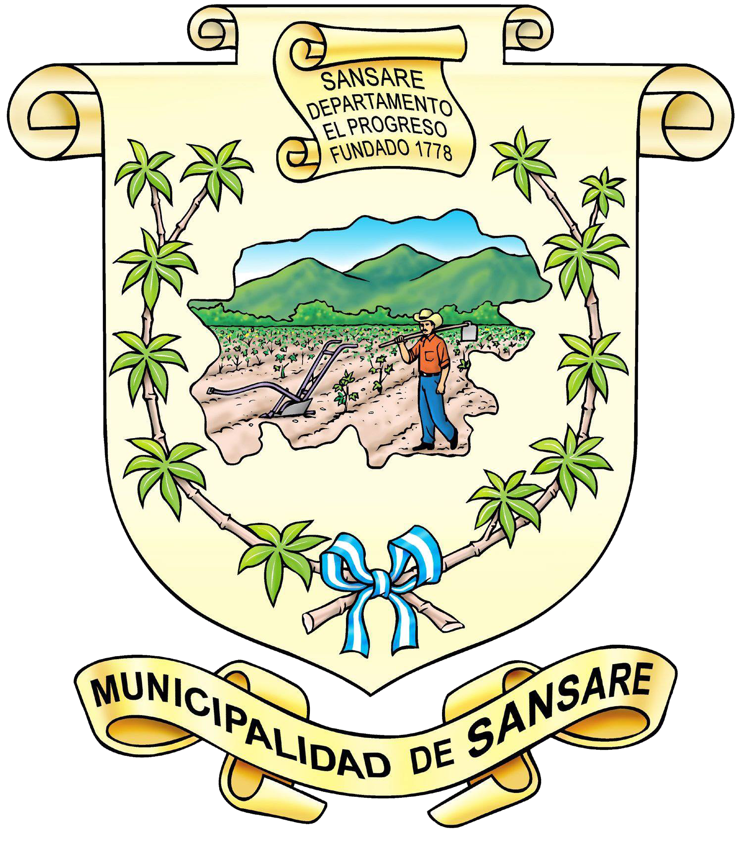 Escudo de Sansare